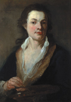 Vlastní portrét s paletou, Norbert Grund, Národní galerie v Praze (O 255)